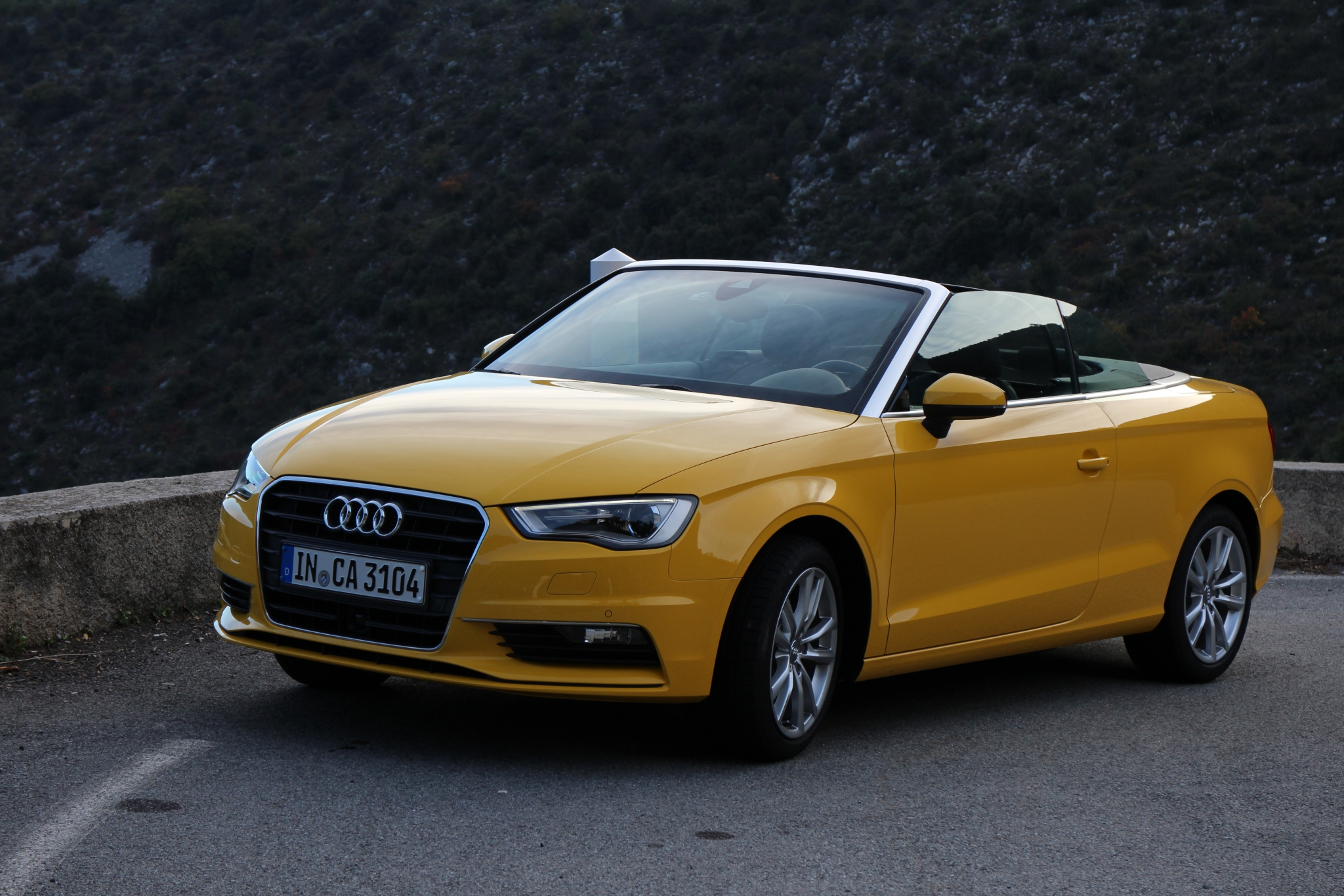 Audi A3 Cabrio 2013